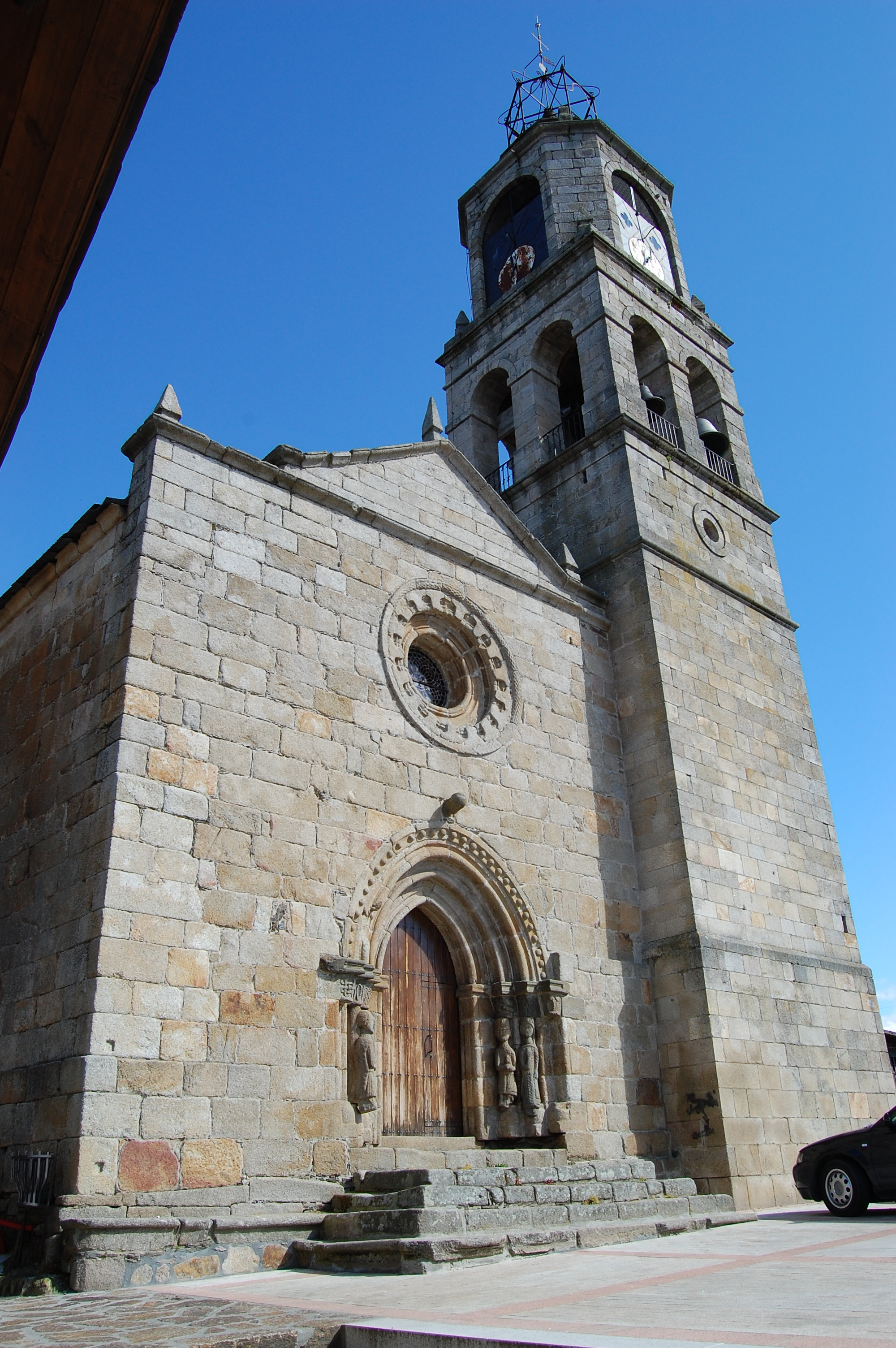 Puebla de Sanabria (Póvoa de Seabra), província de Zamora, Espanha.